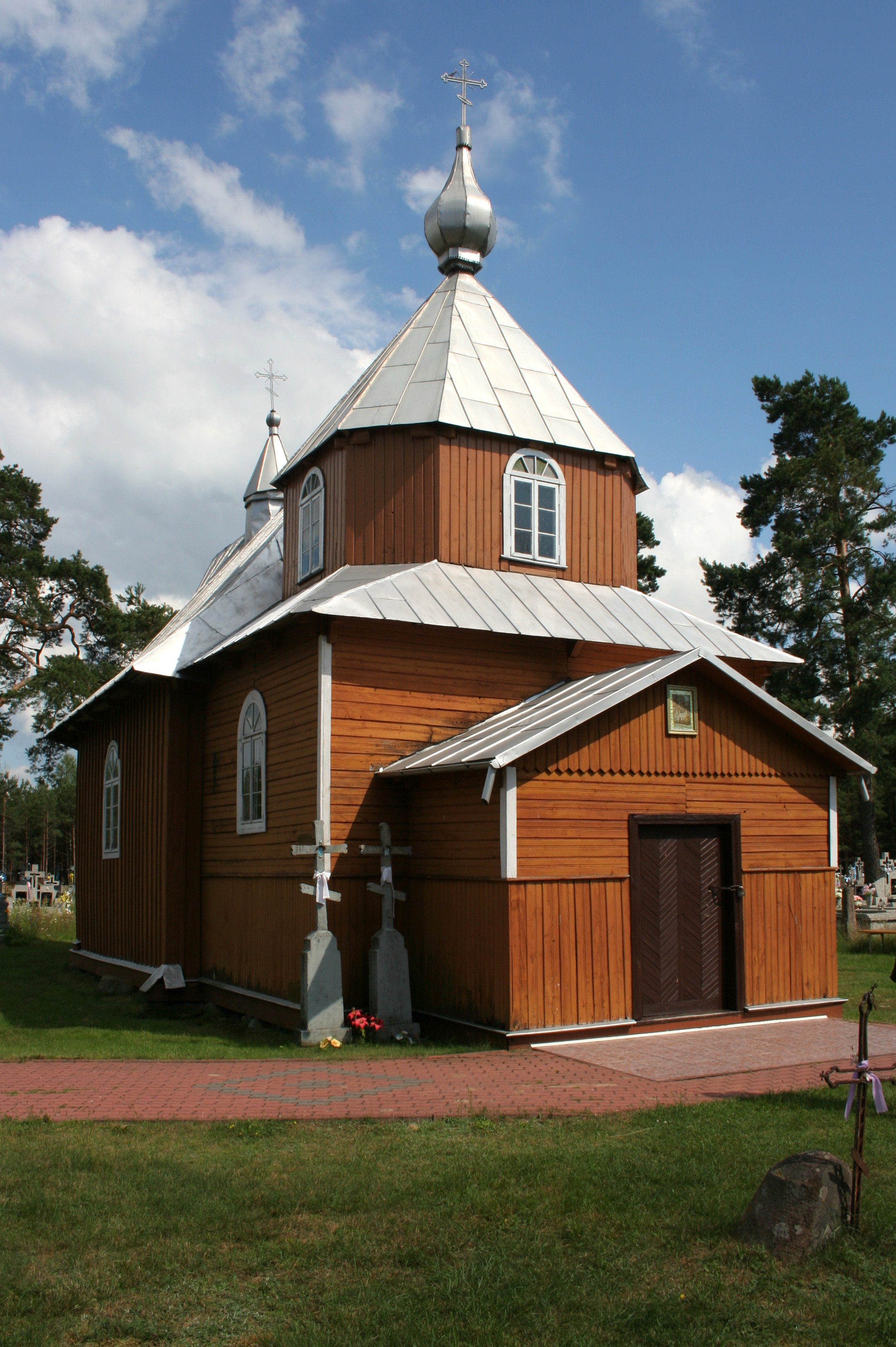 Cerkiew św. Kosmy i Damiana w Czeremczy-Wsi.